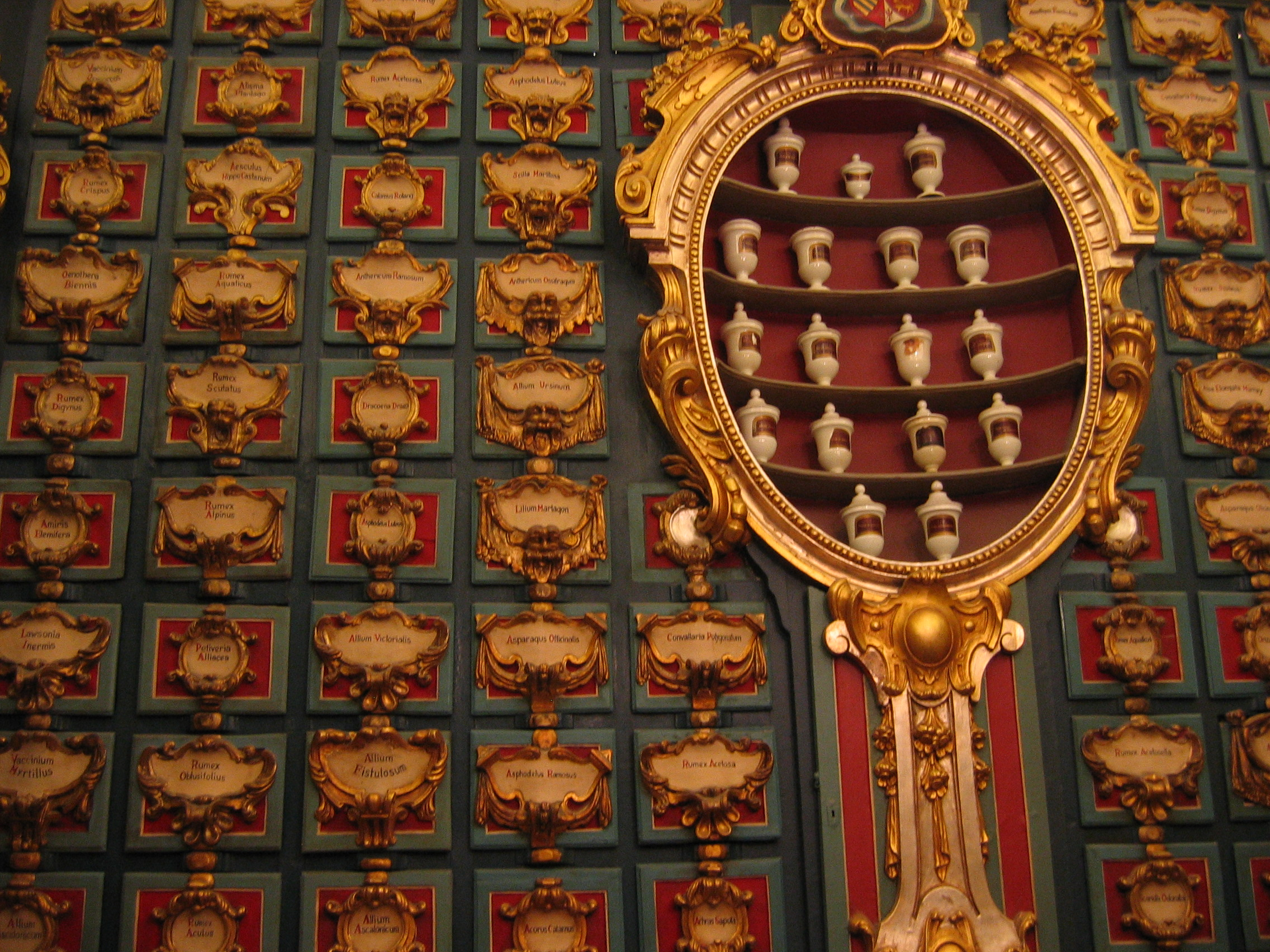 Opname van de Real Farmacia in het Palacio Real in Madrid.